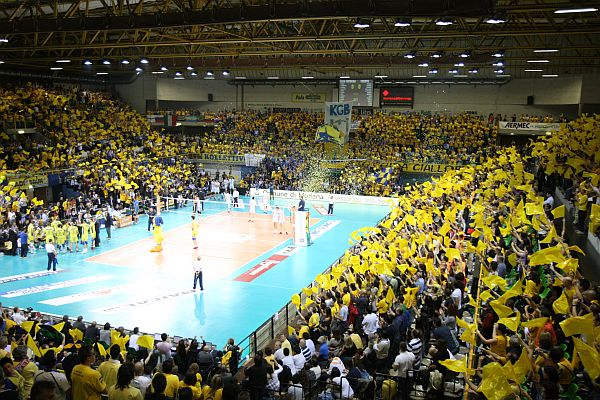 Modena (Italy), PalaPanini Casa Modena indoor sporting arena.